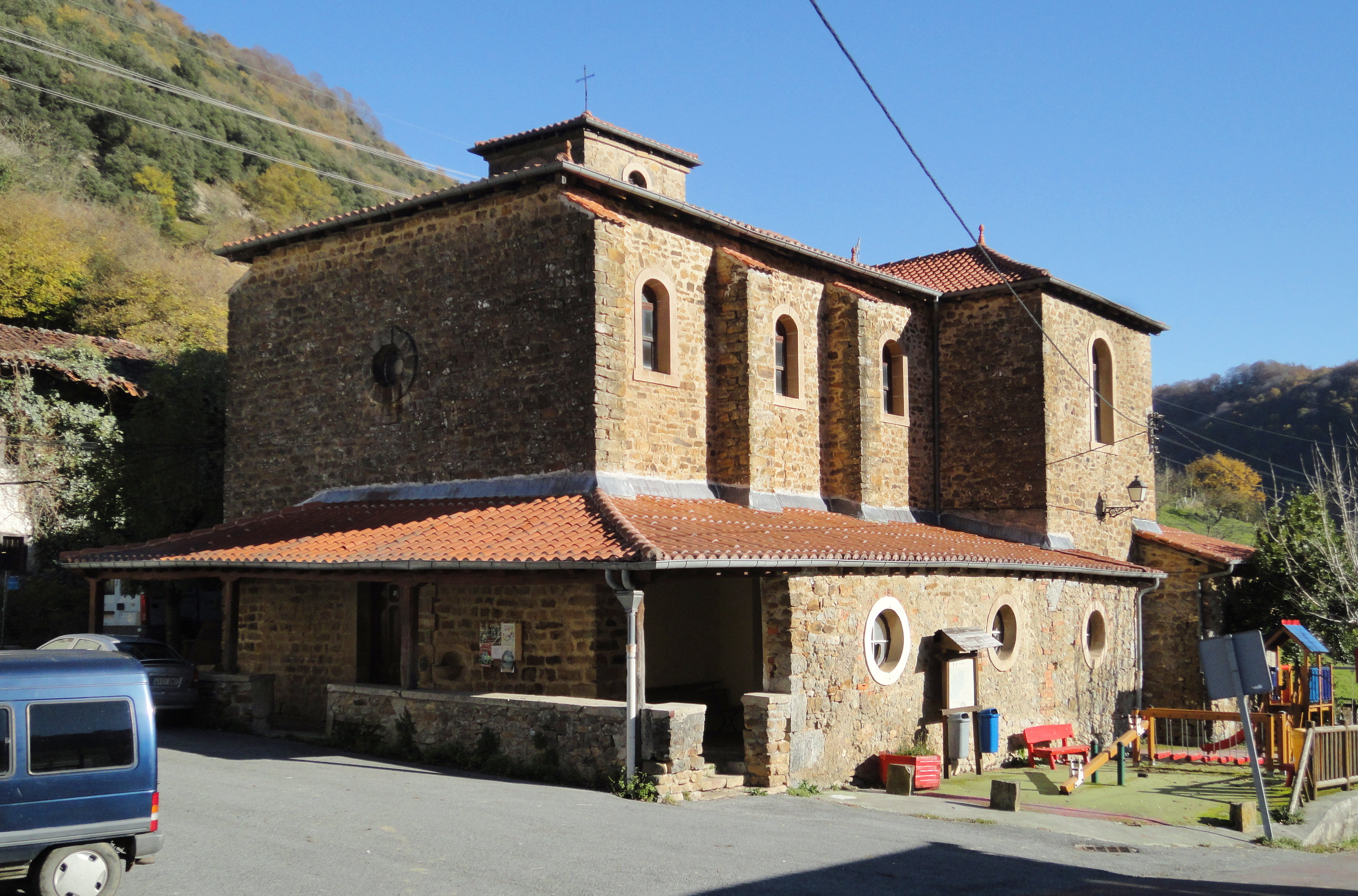 Santa Isabel eliza - Aia auzoa, Ataun